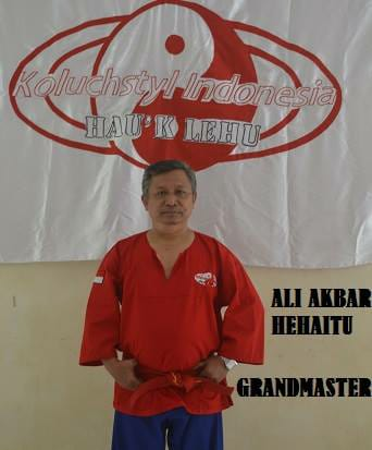 Grand Master Ali Akbar Hehaitu. Presiden Koluchstyl Indonesia